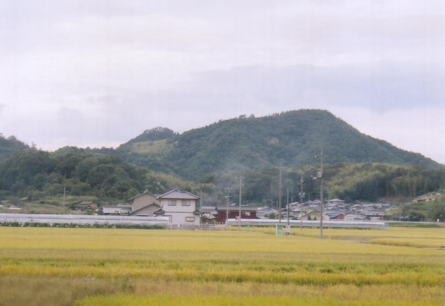 Sj-kimura